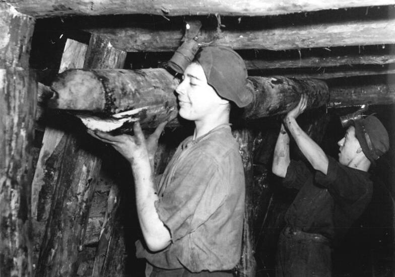 Bergarbeiter absteifend Zentralbild Sturm 17.1.1952 100m unter der Erden-im Braunkohlenschacht in Dölitz bei Leipzig.Die Lehrlinge in den Braunkohlenrevieren lernen nicht nur den Tagebau kennen, sondern werden auch mit der Arbeit unter Tage in besonderen Lehrschächten vertraut gemacht. Im Lehrschacht in Dölitz, der in 100 m Tiefe liegt.UBz: Das Absteifen ist eine schwierige aber sehr wichtige Arbeit im Braunkohlenschacht.